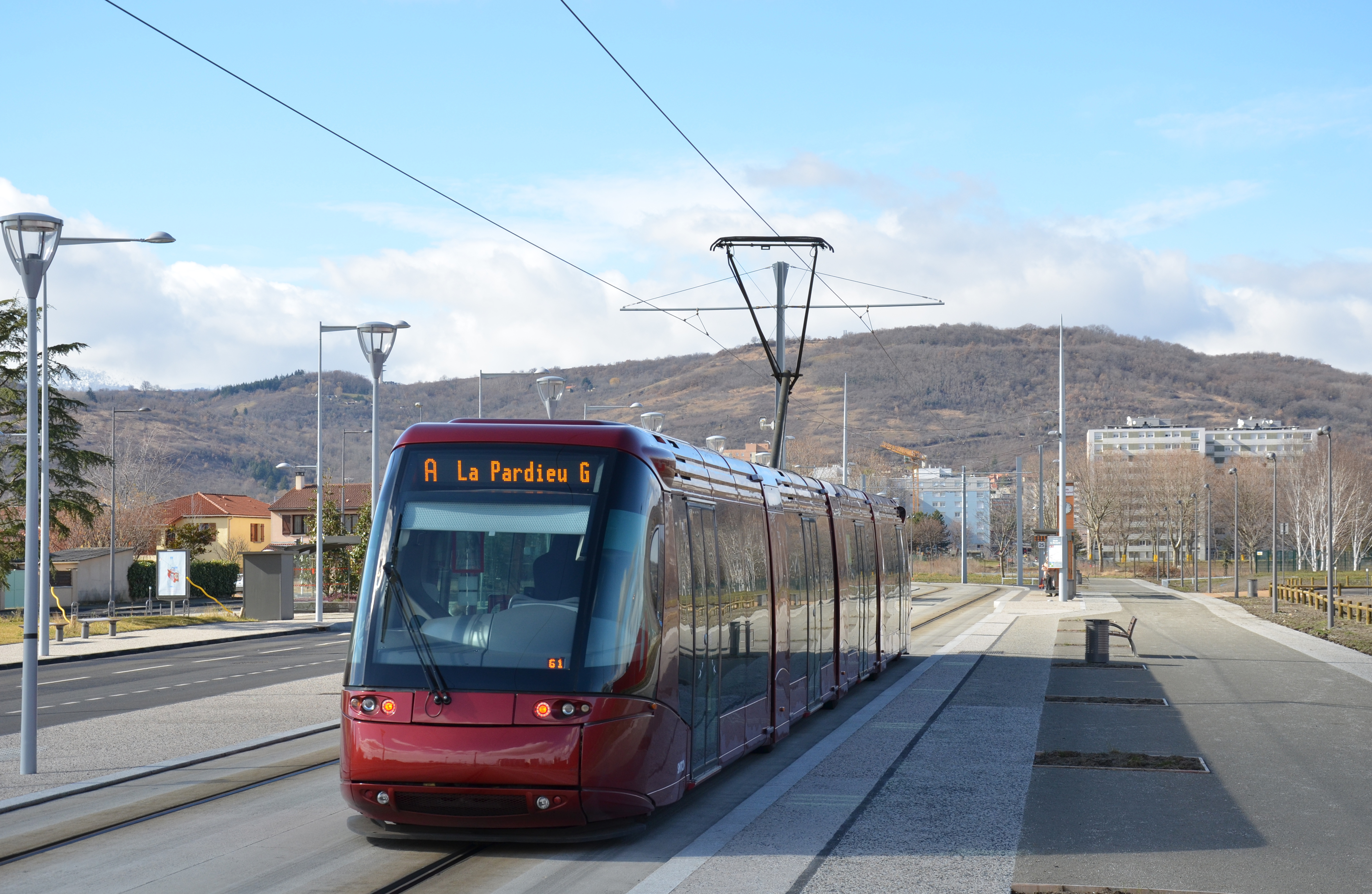 Tramway sur pneus Translohr STE4 n°2 du réseau T2C de Clermont-Ferrand, près de l'arrêt Stade Gabriel Montpied.